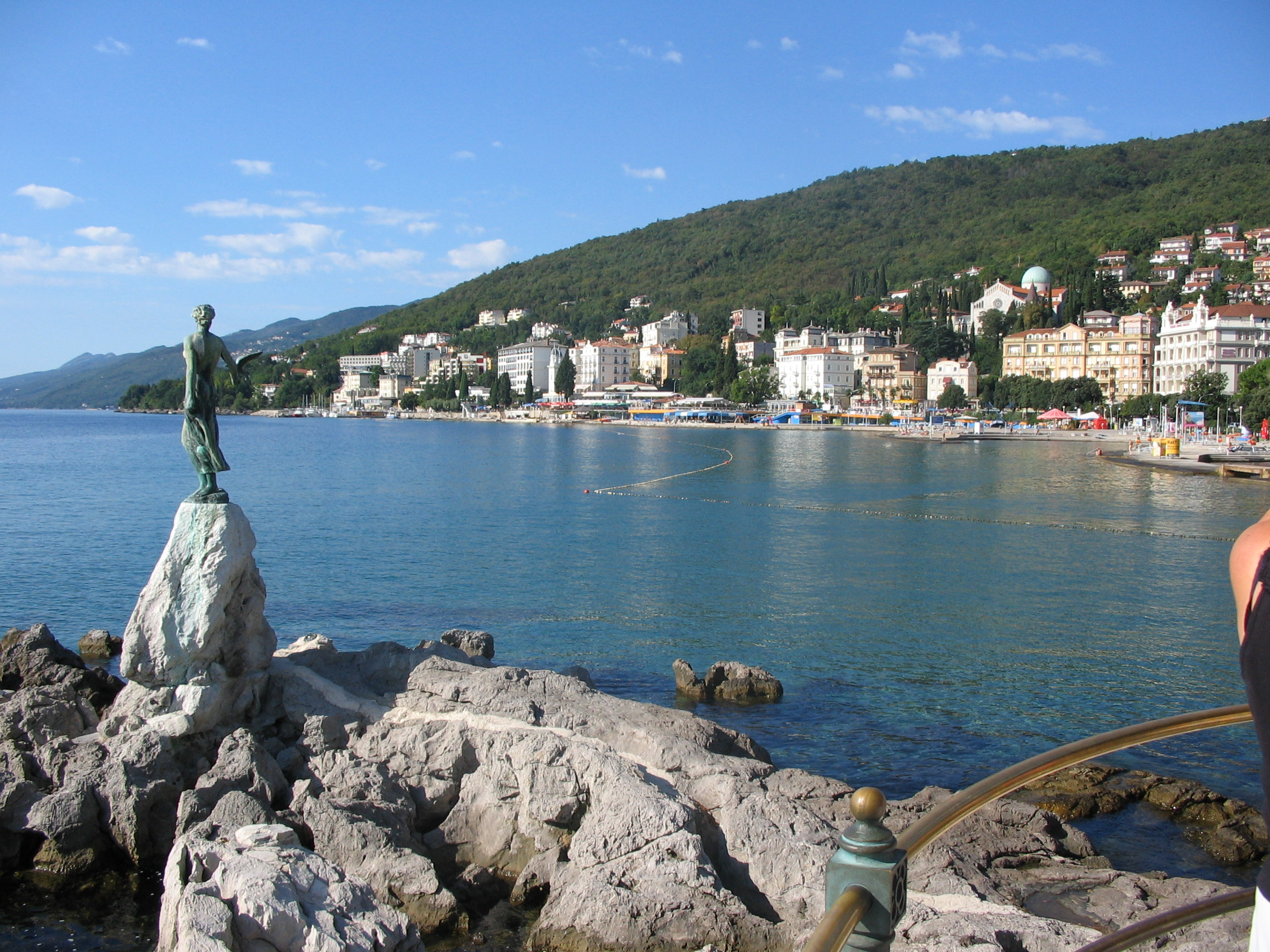 opatija la demoiselle à la mouette vue sur la baie